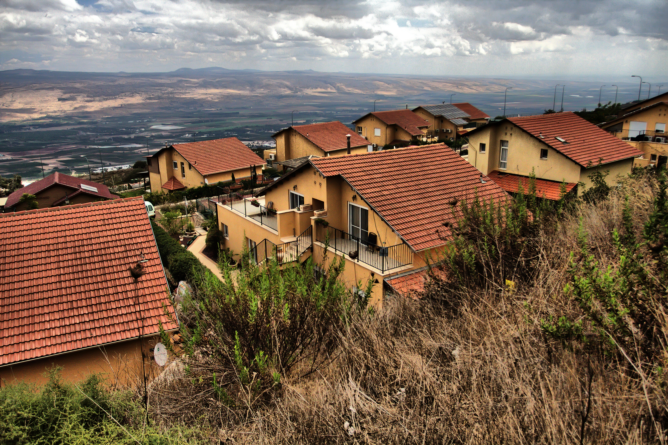 המחשת הבתים בקיבוץ משגב עם והנוף אשר נראה כמעט מכל מרפסת